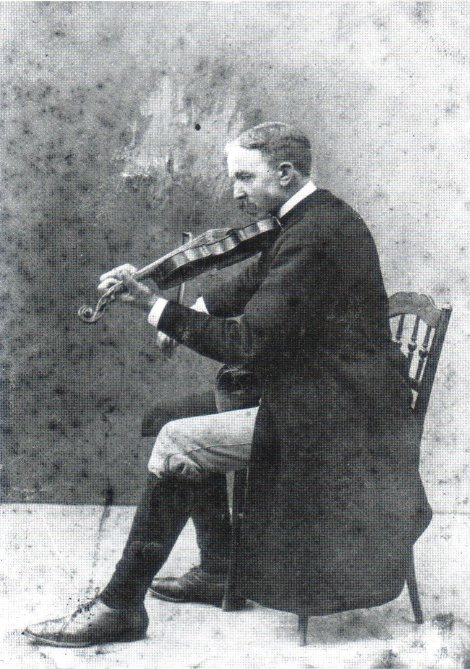 Hjort Anders Olsson (1865-1952)